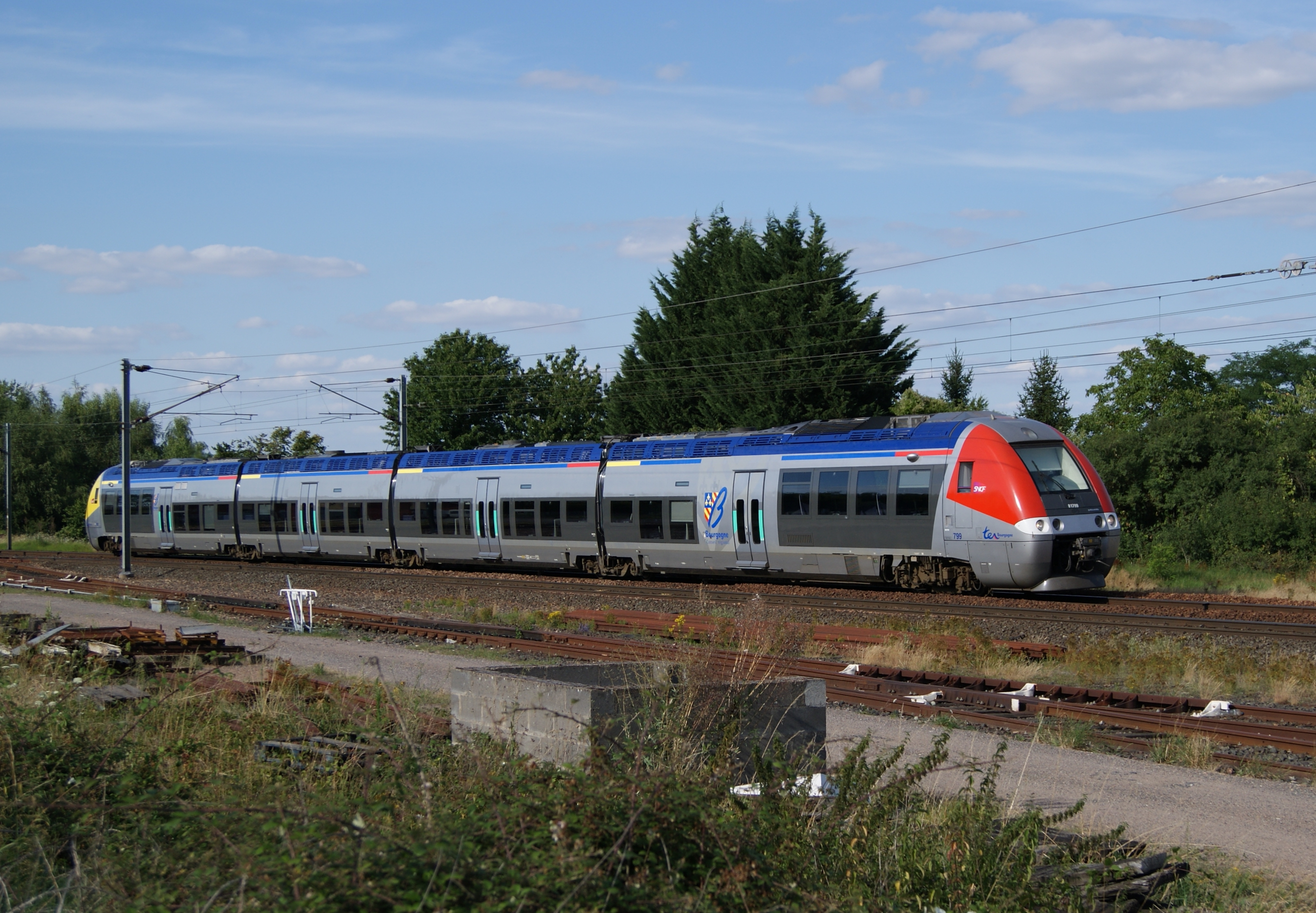 Un BGC Bourgogne à La Charité-sur-Loire.